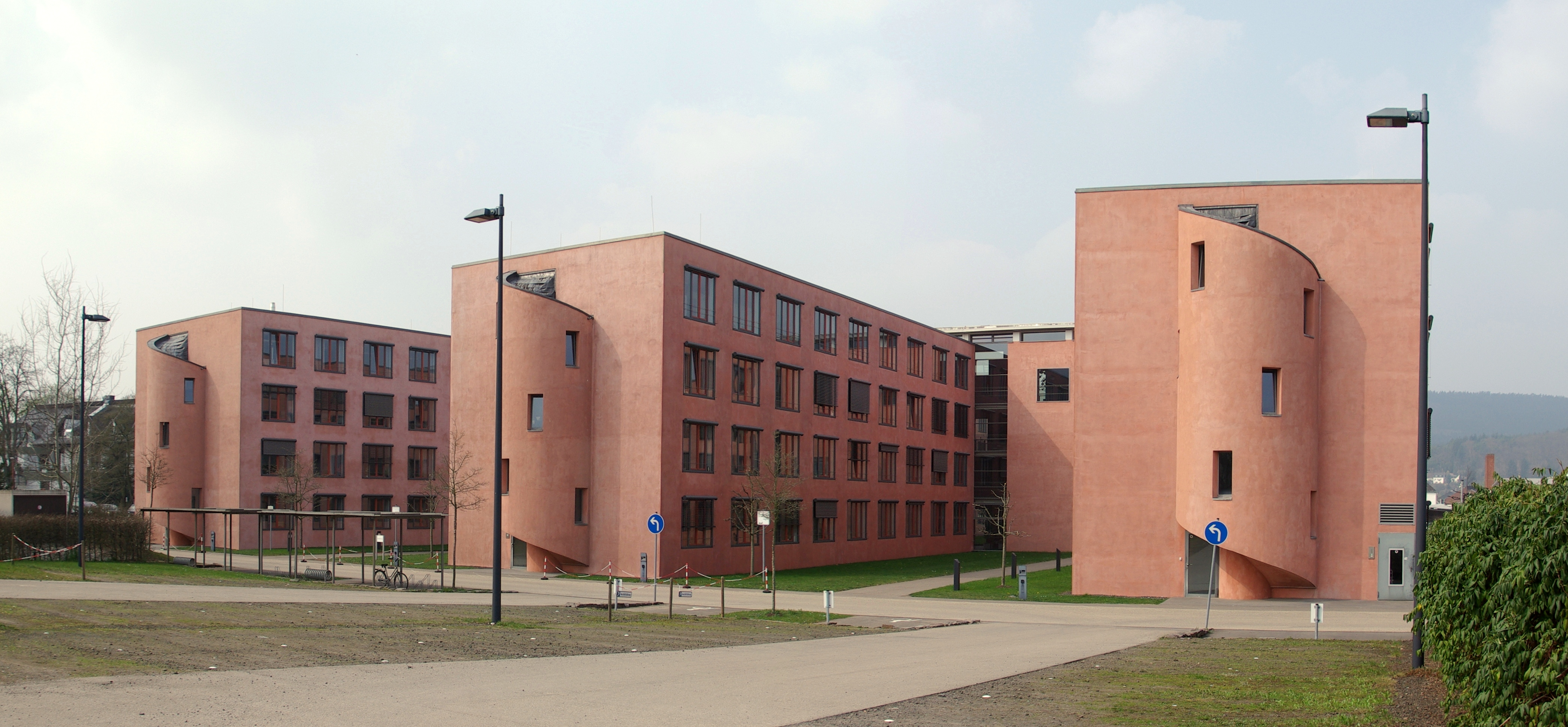 Trier, Agentur für Arbeit Architekt: Gottfried Böhm